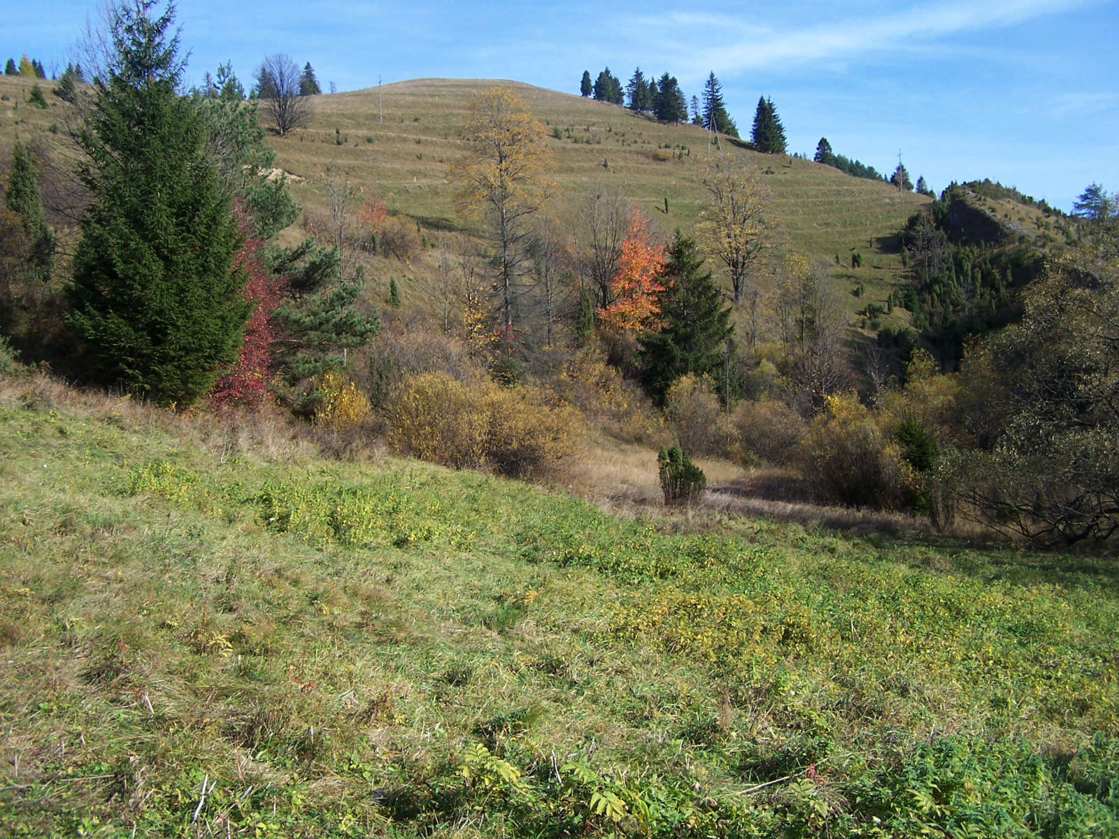 Biała Woda (Pieniny)